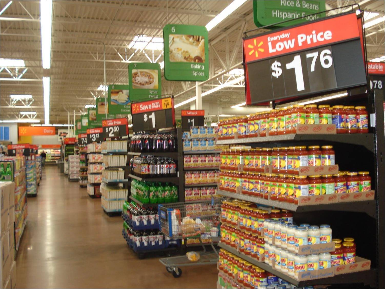 Walmart